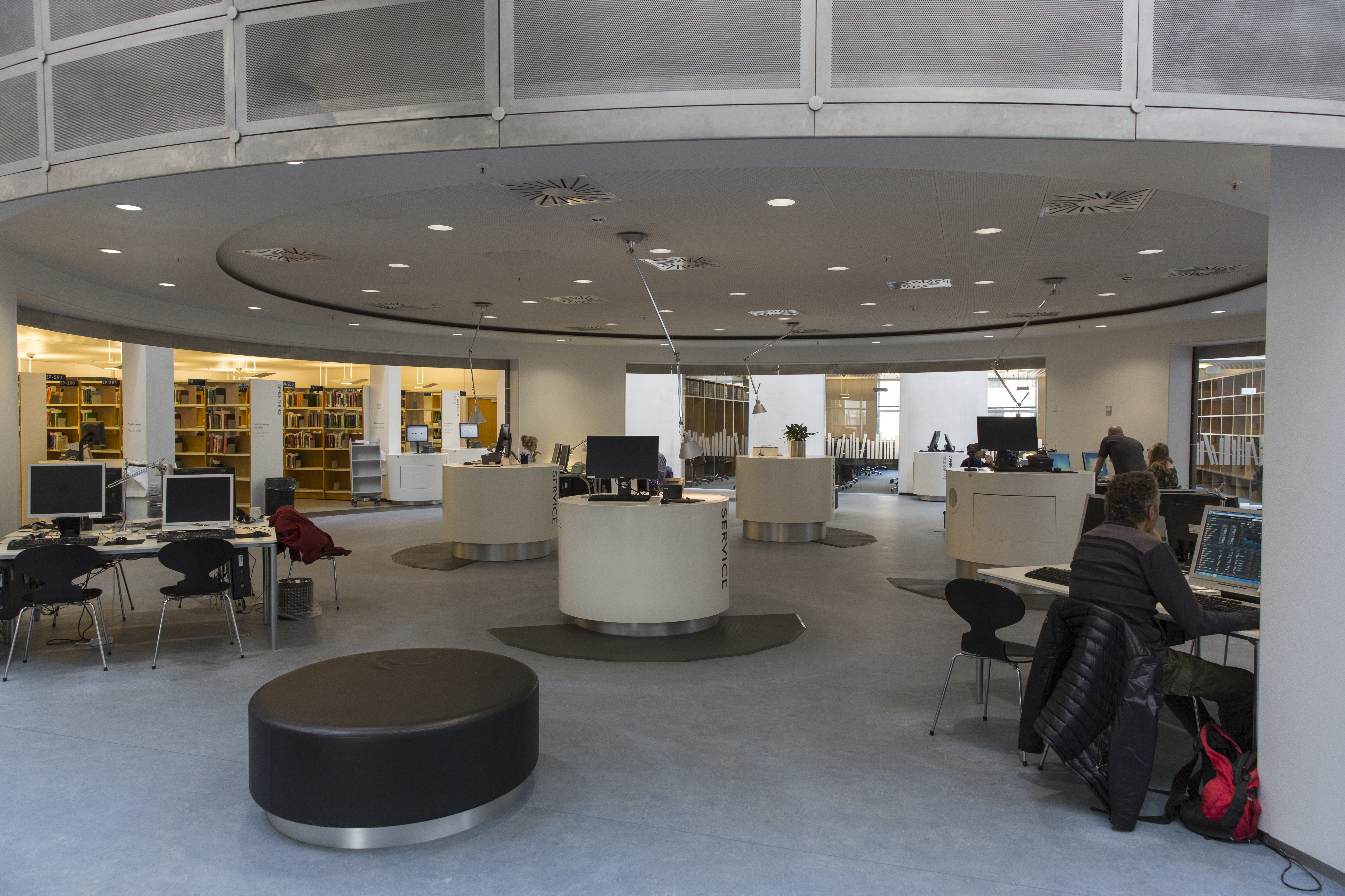 Statsbiblioteket - Servicecentret